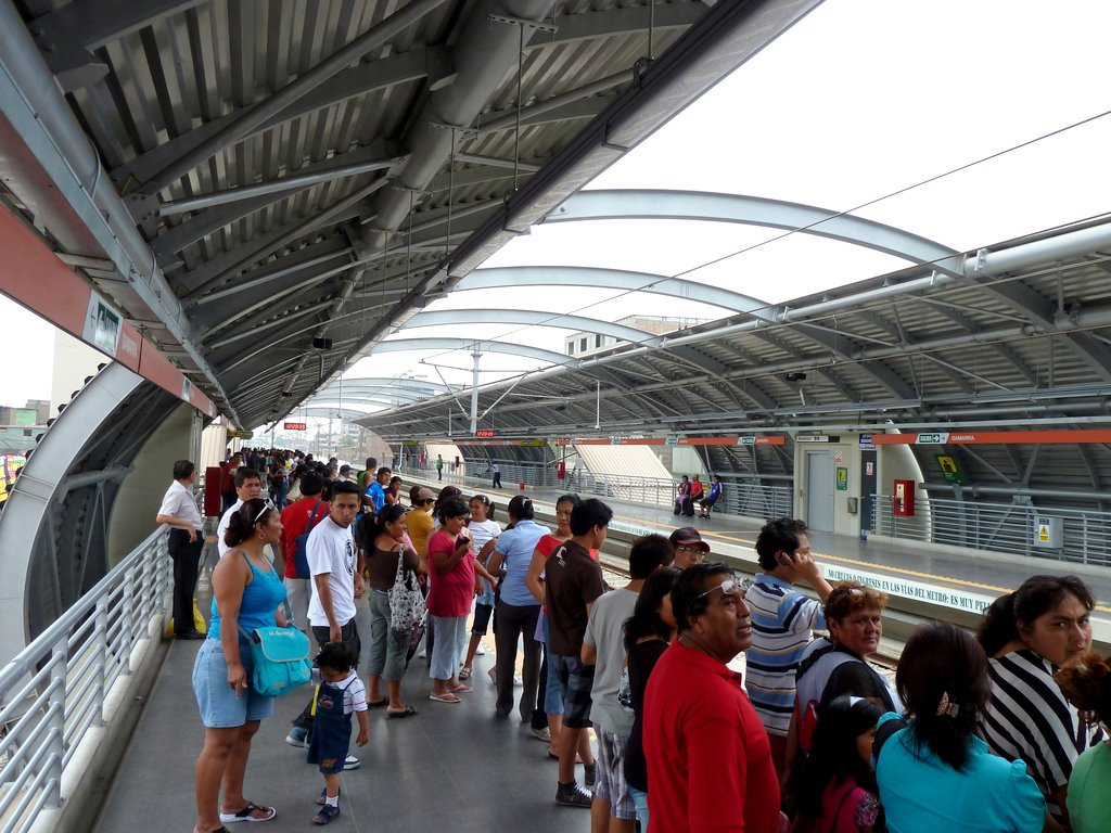 Lima Metro Line 1 - Gamarra Station. Lima, Peru.